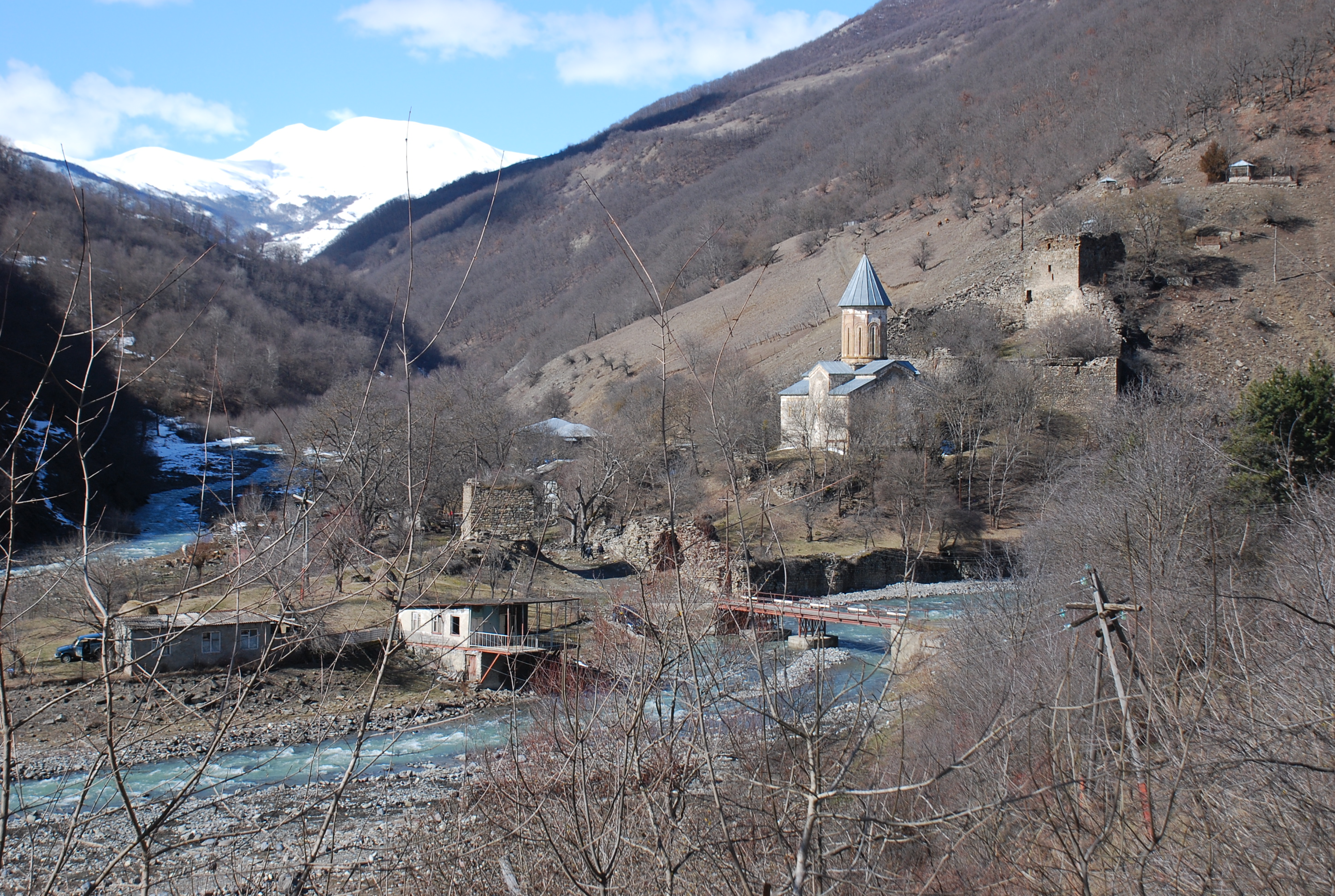 გუმბათიანი ეკლესია „თედოწმინდა“